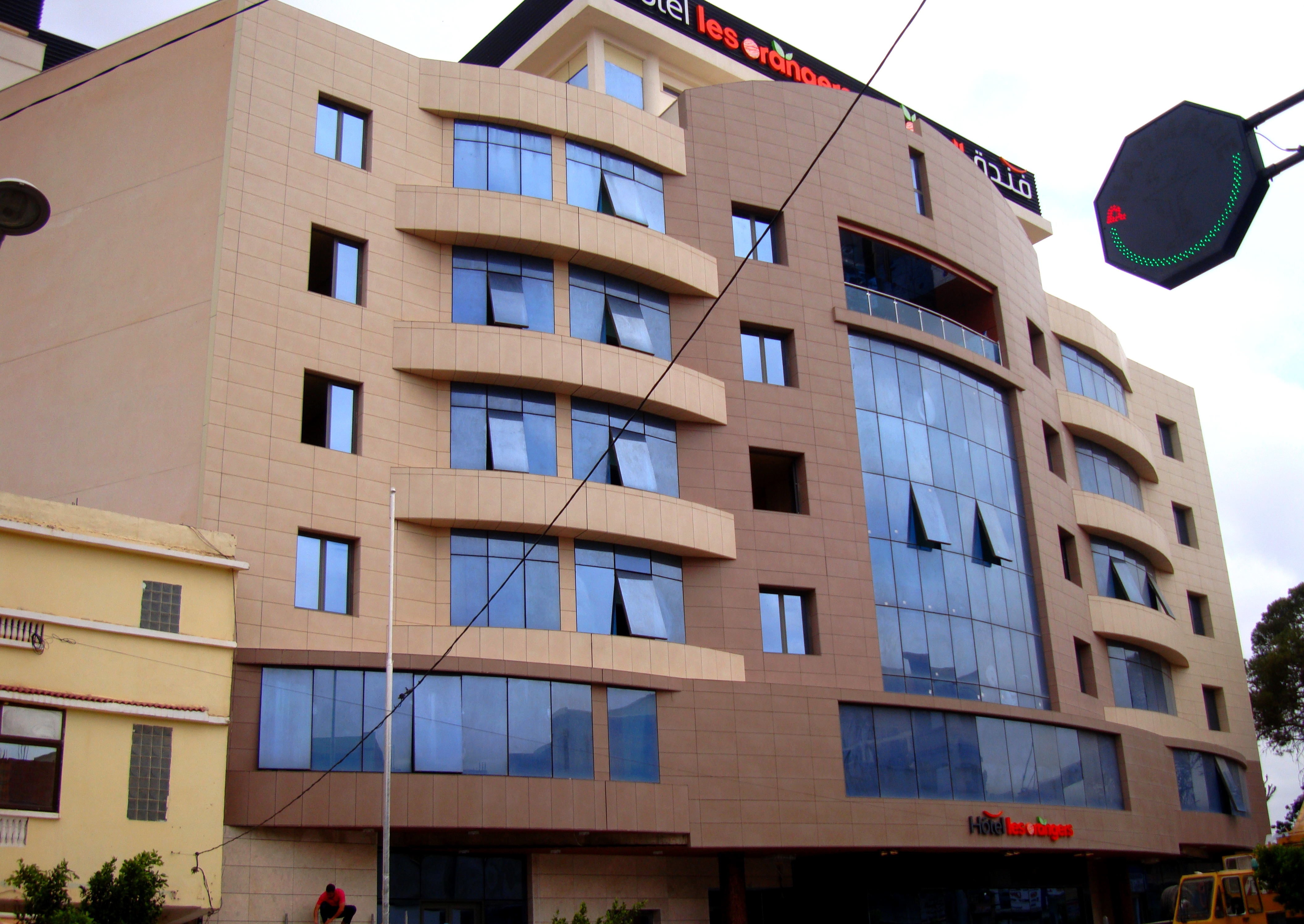 Hôtel les orangers en construction (Juin 2019)